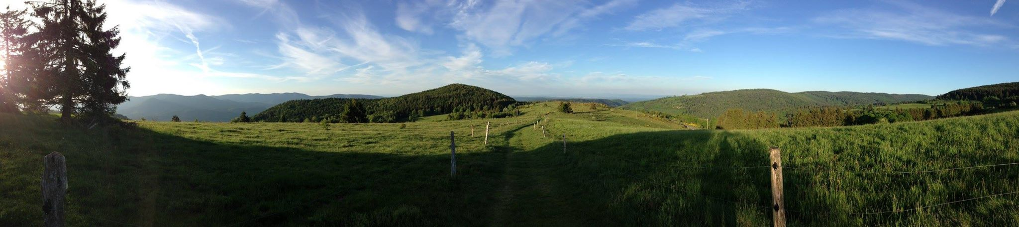 Cette photo prise sur la crête du Hohbuhl, près de Grendelbruch. En été, les vaches viennent y paître paisiblement. Cette zone de silence est interdite aux véhicules à moteurs, et aux transistors. La photo a été prise près de la table panoramique du Club Vosgien, au pied de la balise météorologique du club FFVL.